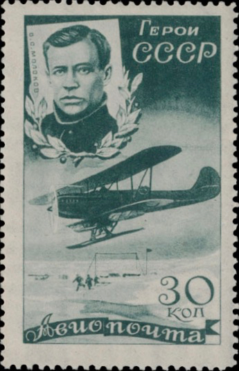 Почтовая марка СССР - Молоков Василий Сергеевич, Герой Советского Союза